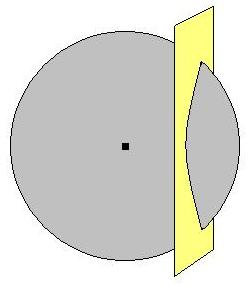 Esfera seccionada, que da origem a duas calotas. Quando a superfície externa ou interna é refletora de luz (reflexão regular), da origem a espelhos convexos e côncavos, respectivamente.